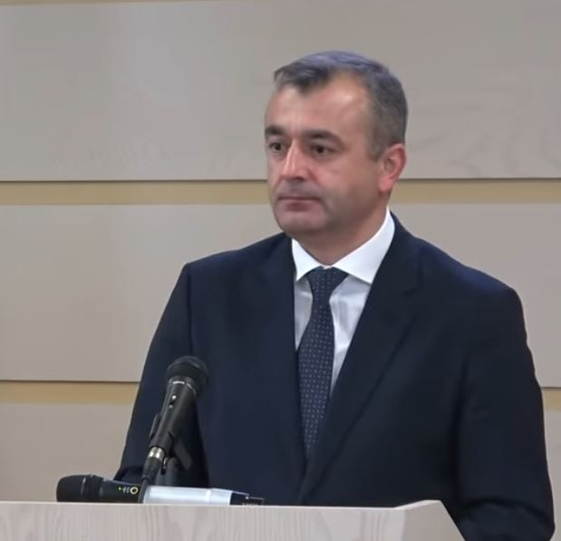 Prim-ministrul Republicii Moldova Ion Chicu în timpul unei conferințe de presă